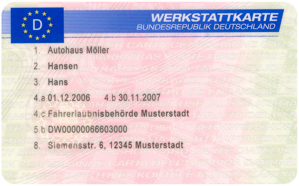 Muster einer deutschen Werkstattkarte für das Kontrollgerät im Straßenverkehr gemäß Verordnung (EG) Nr. 2135/98, Vorderseite